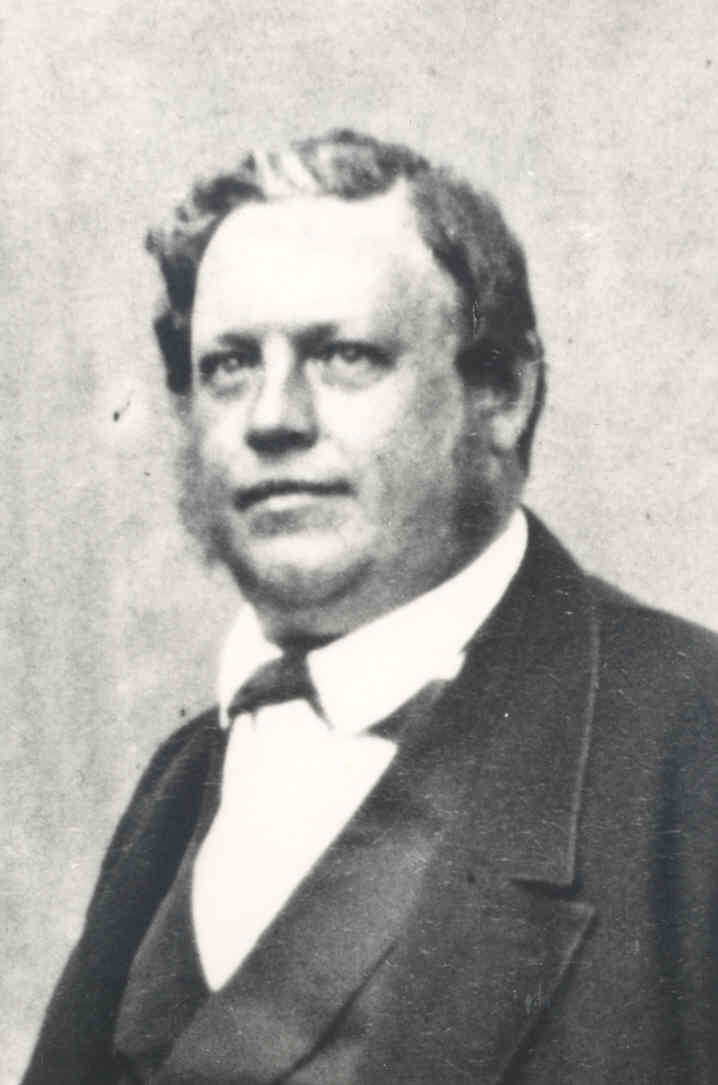 Der Voralrberger Landtags- und Reichsratsabgeordnete Albert Rhomberg